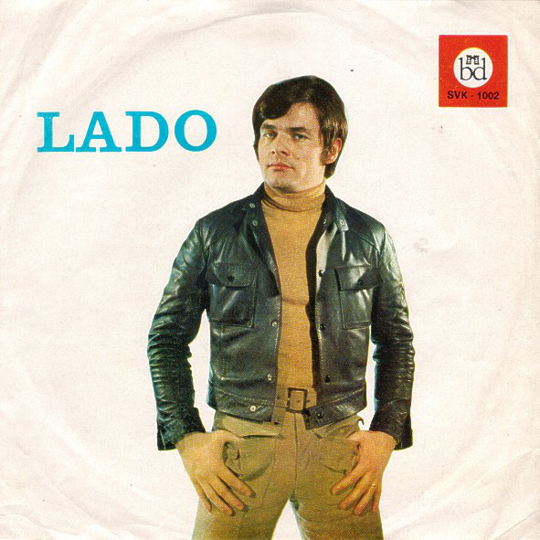 Album Hej brigade pevca Lada Leskovarja.